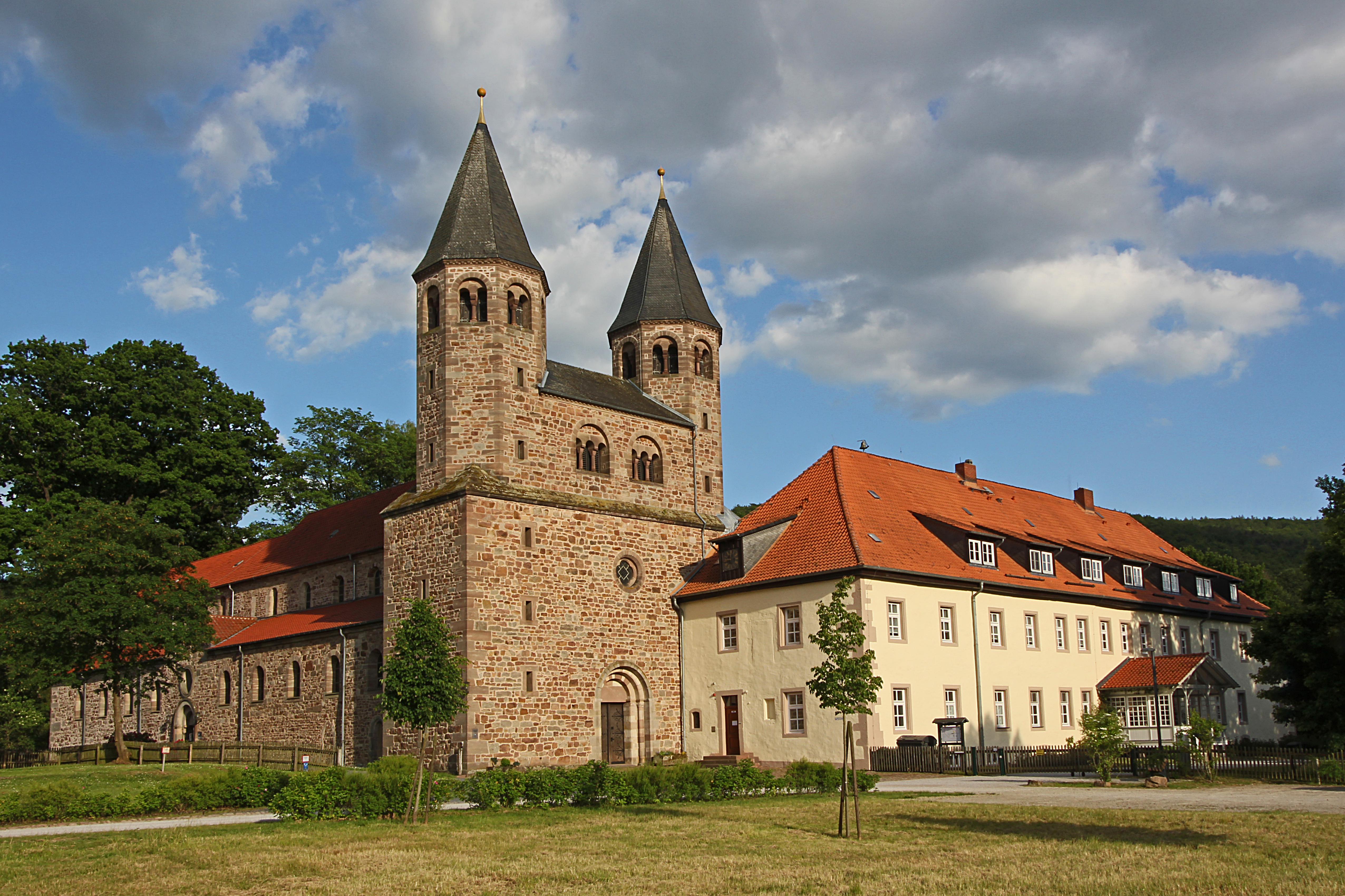 Doppelkirche des ehemaligen Benediktiner-Klosters Bursfelde mit dem Tagungshaus des Geistlichen Zentrums Kloster Bursfelde. Ansicht von Nordwesten.